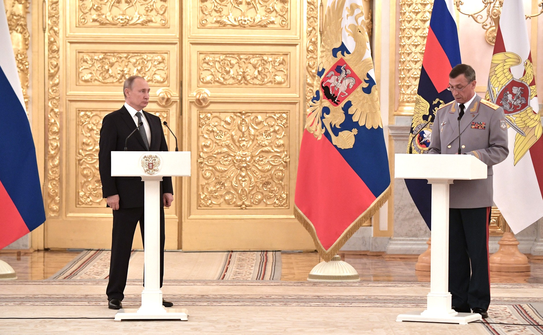 Церемония представления офицеров, назначенных на высшие командные должности. С начальником Главного управления боевой подготовки Вооружённых сил Российской Федерации, генерал-полковником Иваном Бувальцевым.